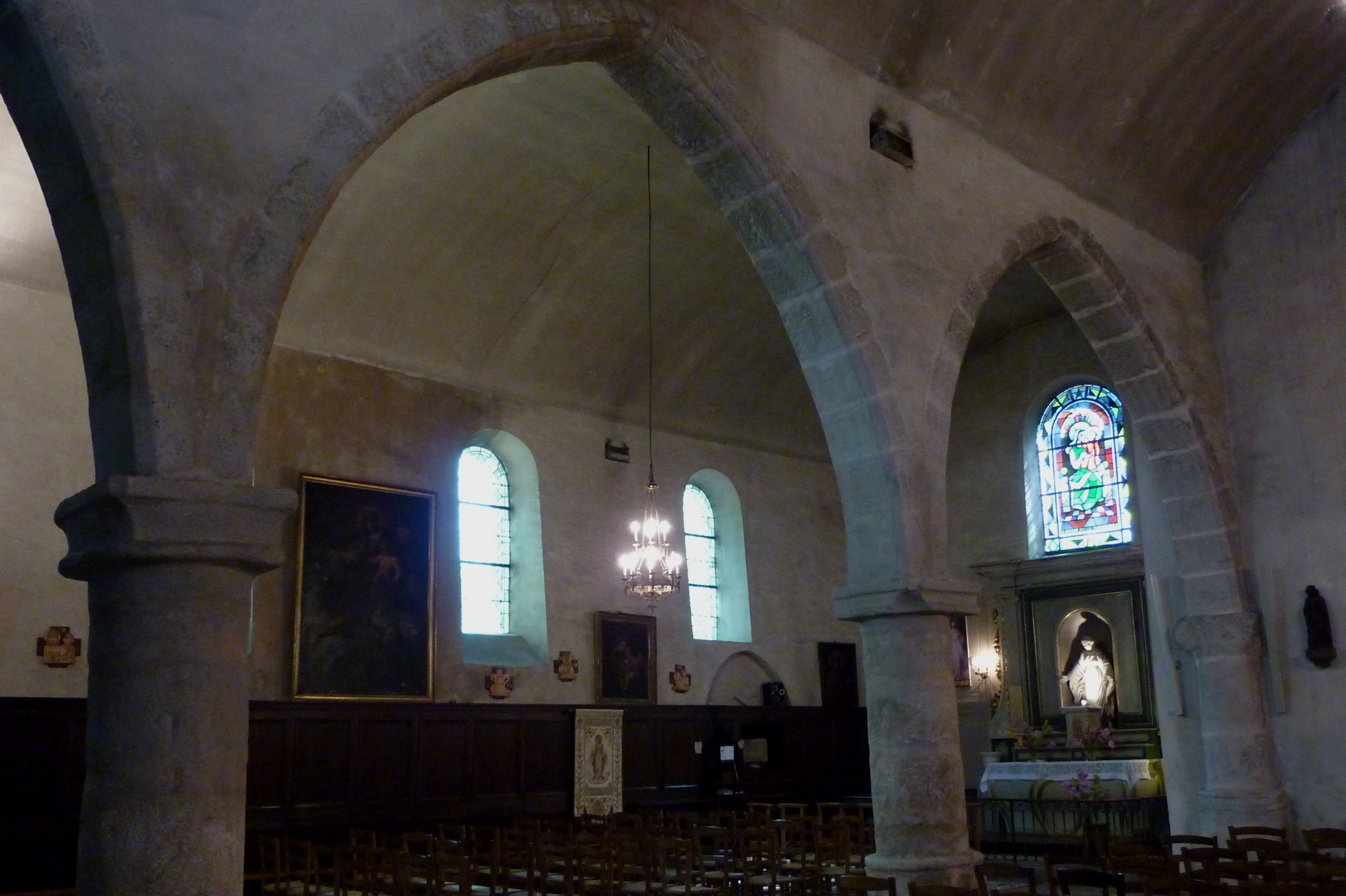 Katholische Pfarrkirche Saint-Corneille in Chartrettes im Département Seine-et-Marne in der Region Île-de-France (Frankreich), Innenraum mit Spitzbogenarkaden